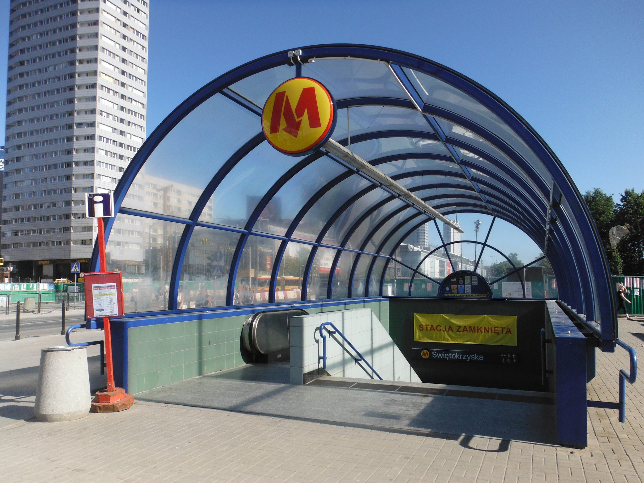 Zamknięta stacja metra "Świętokrzyska" w czasie budowy centralnego odcinka II linii metra.